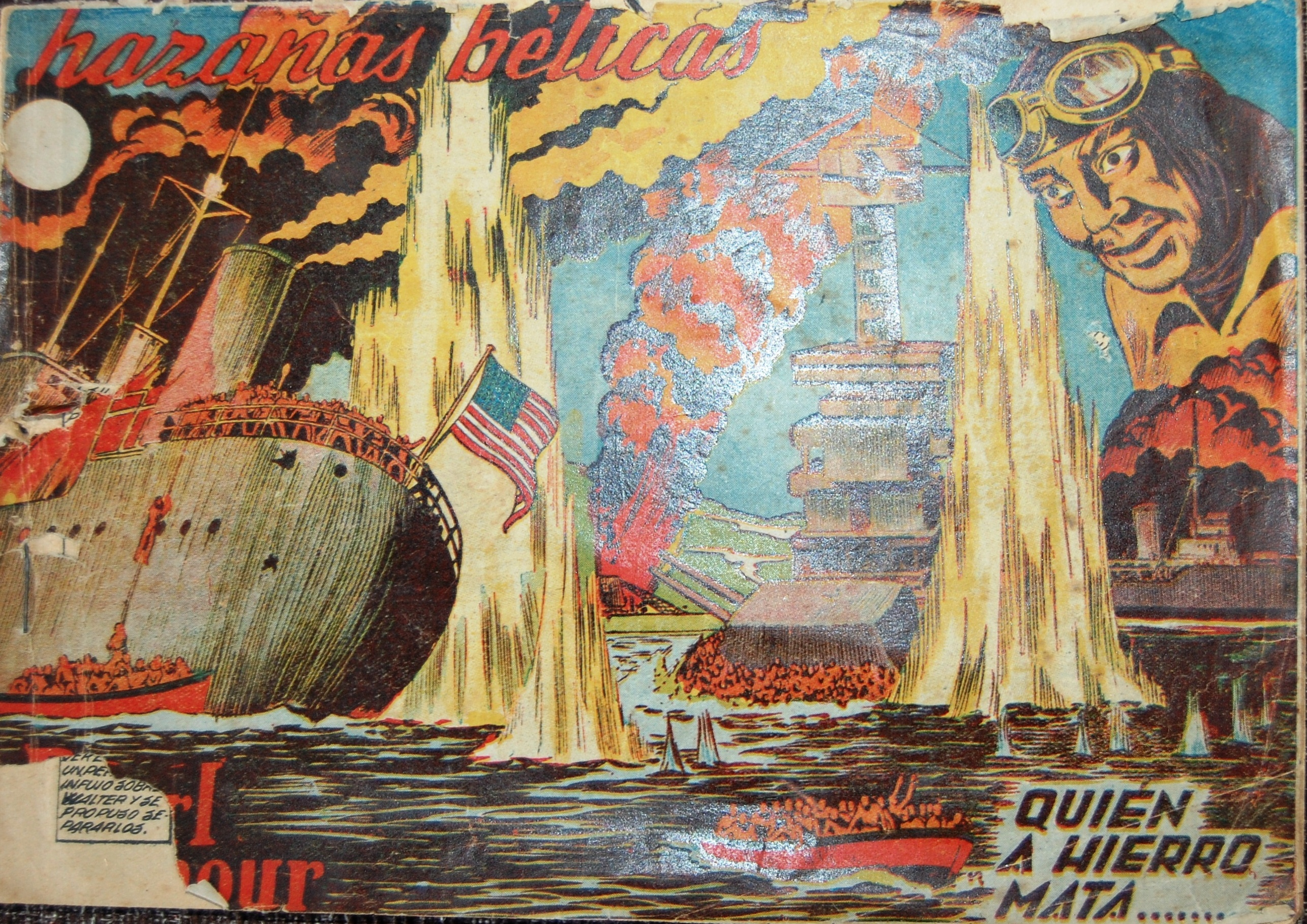 Nº 1 de la primera edición de Hazañas Bélicas